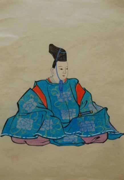 津軽承祐の肖像。